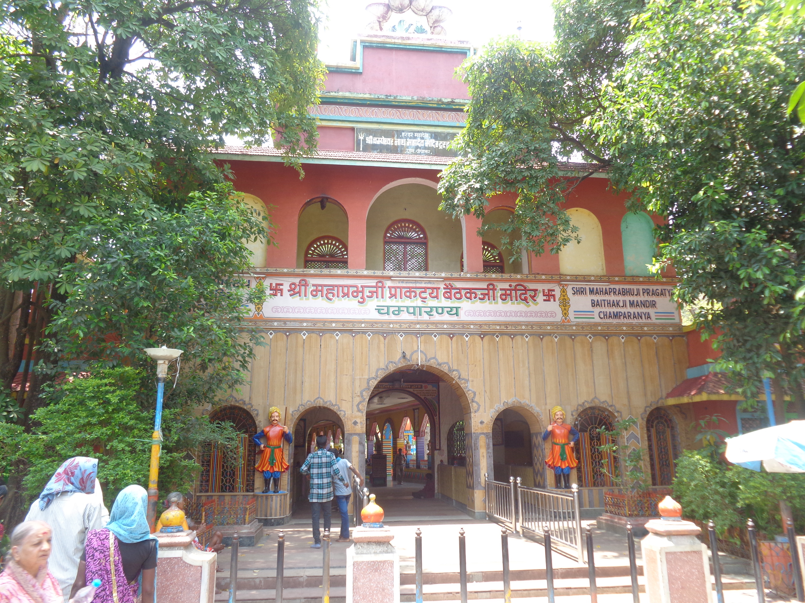 balakrishana lalji mandir and prakatya baithakji mandir are the two mandirs at champarn Dist of chattisgarh. of prabhu sampraday of vaishnava cult